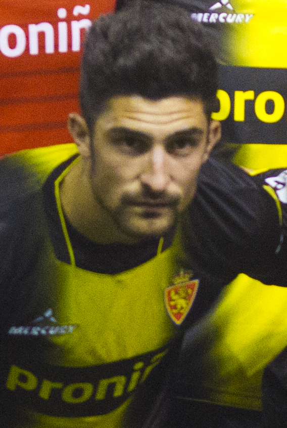 rayo vallecano vs real zaragoza